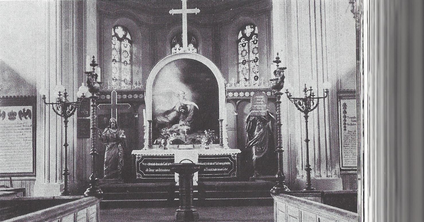 Altar der Johanniskirche Memel